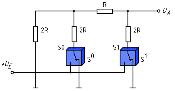 Dëst Bild weist d'Prinzipschaltung vun engem R-2R-Netzwierk